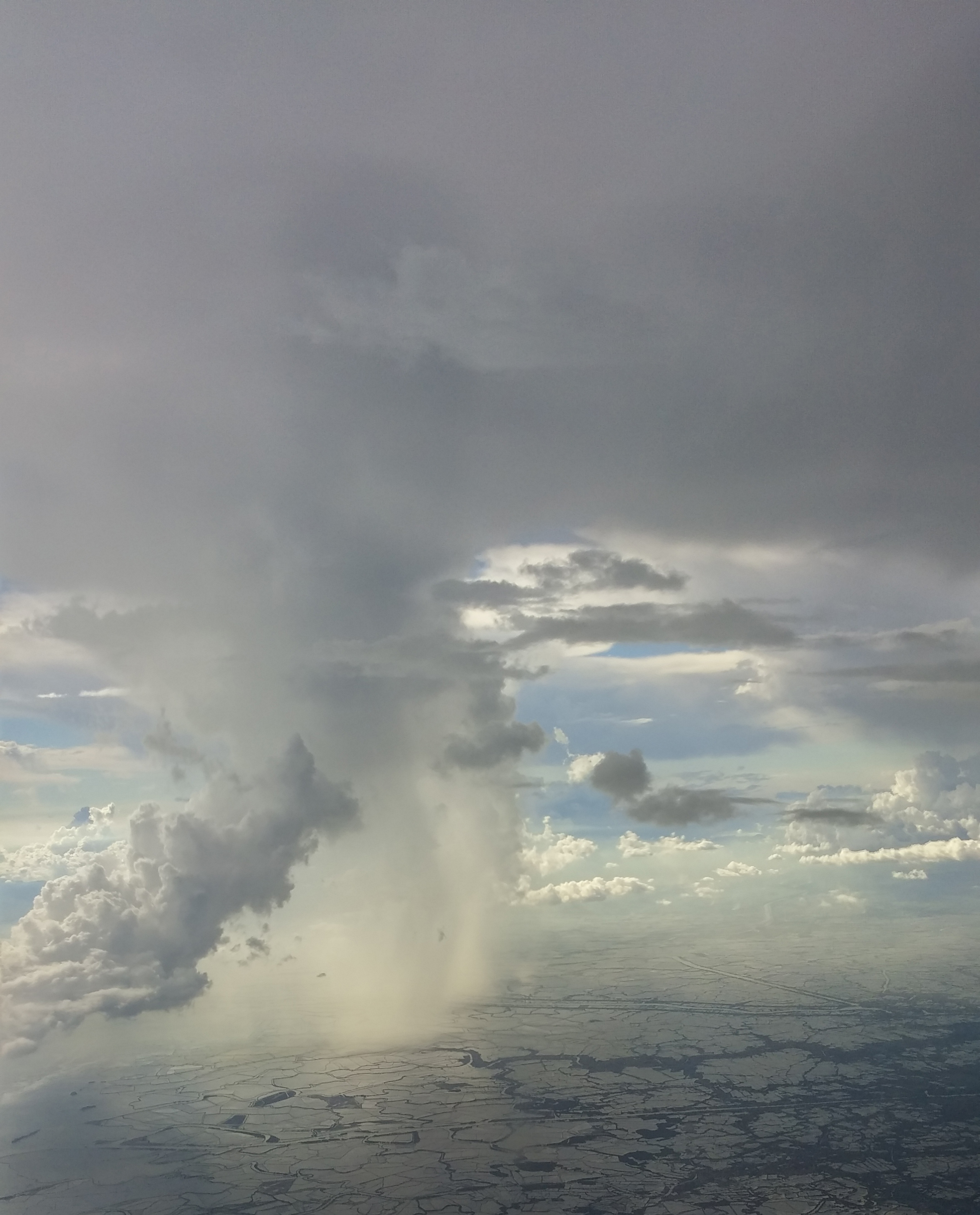 수증기 (2)